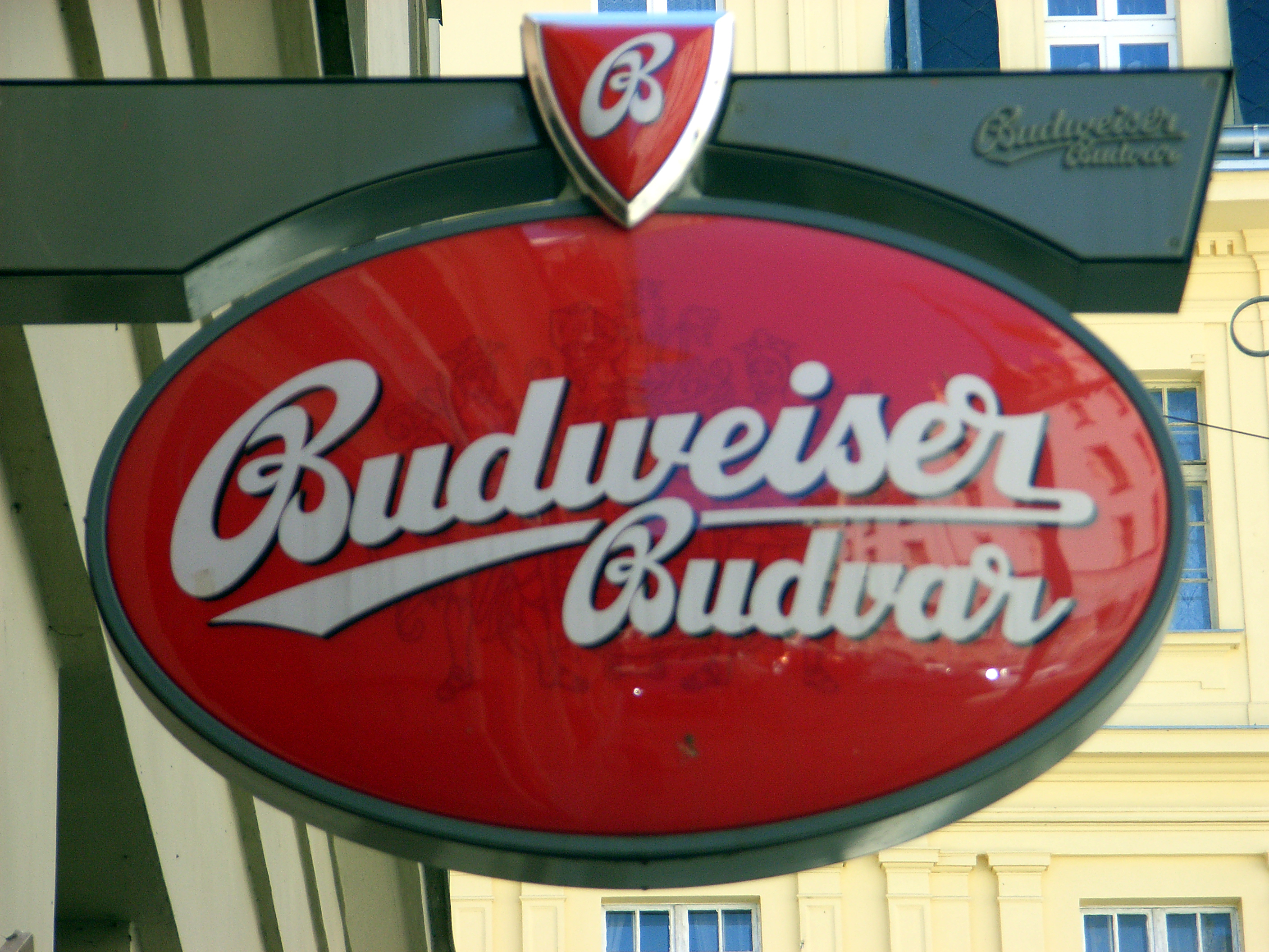 Budweiser-Werbung in Karlsbad